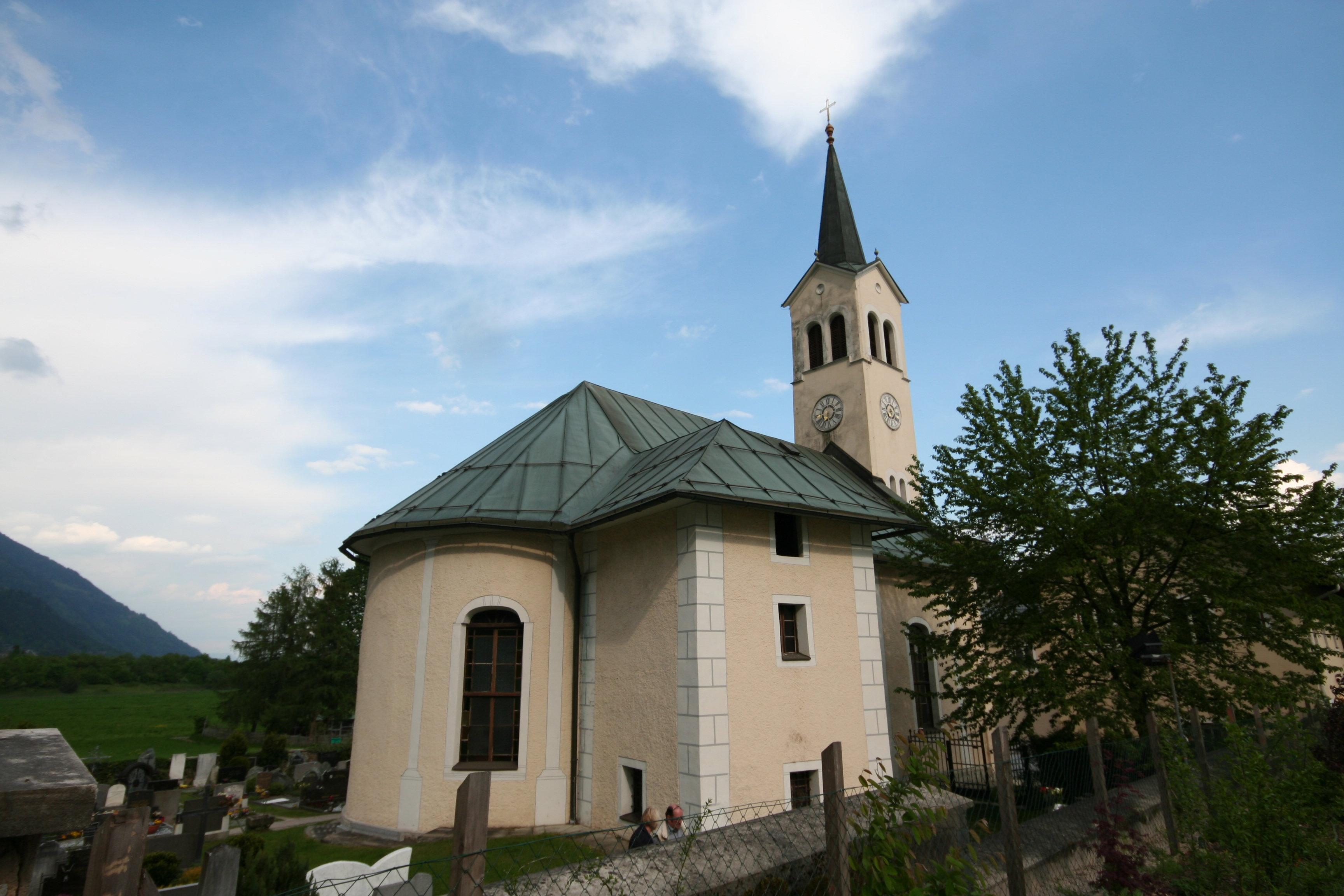 Evangelische Kirche in Sankt Ruprecht bei Villach